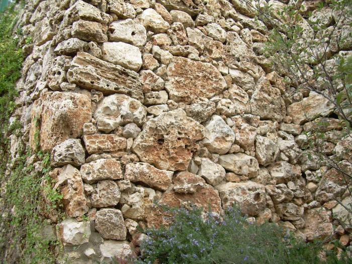 גדר סלעים ירושלמית